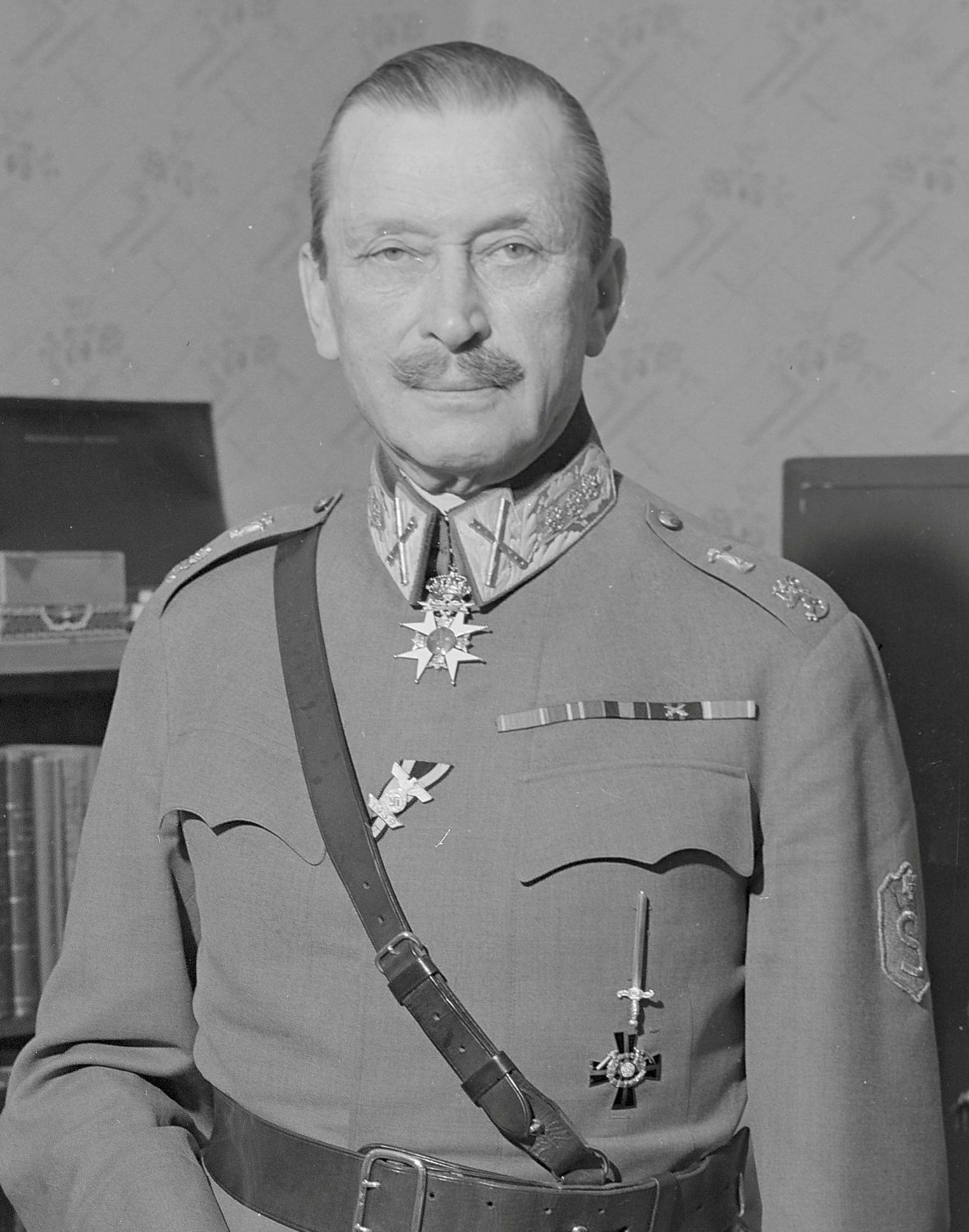 Sotamarsalkka Mannerheim Mikkeli (cropped version)